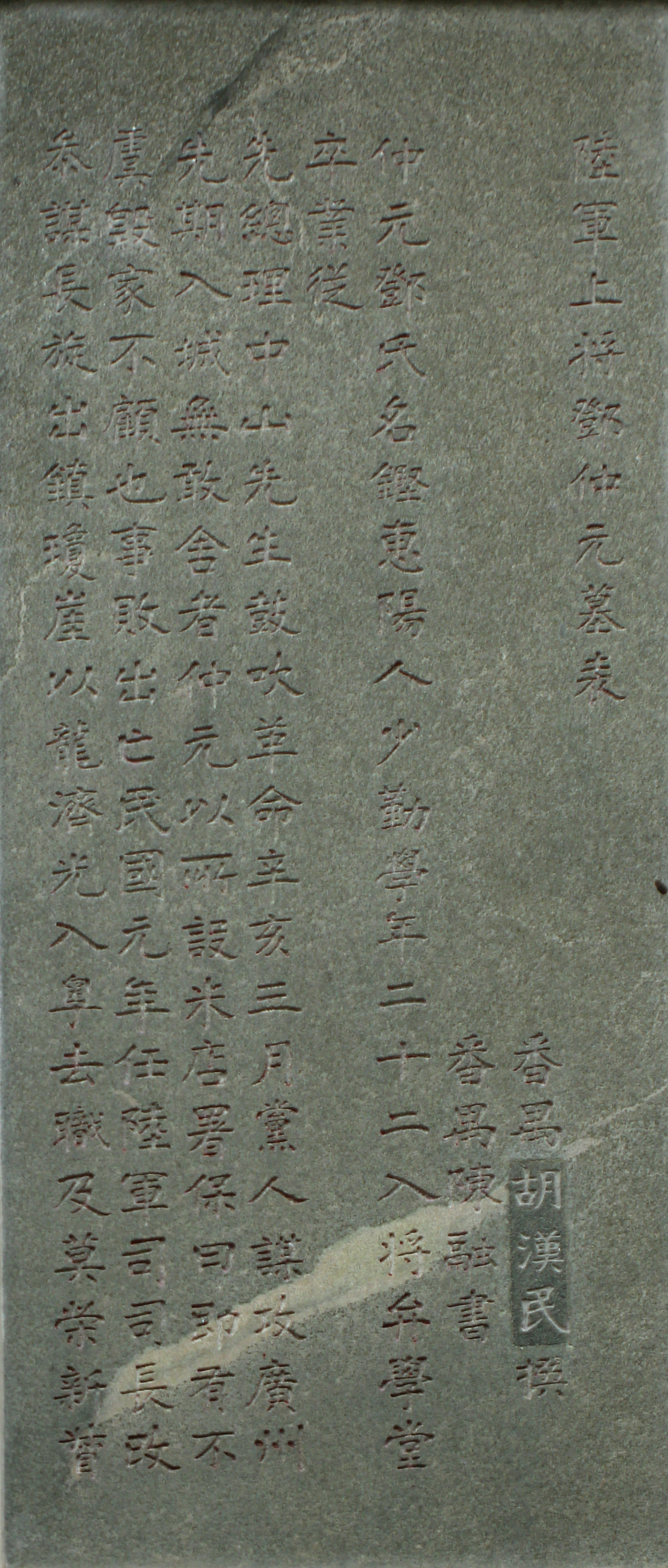 原文： 陸軍上將鄧仲元墓表 番禺胡漢民撰 番禺陳融書 仲元鄧氏名鏗惠陽人少勤學二十二入將弁學堂卒業從 先總理中山先生鼓吹革命辛亥三月黨人謀攻廣州先期入城無敢舍者仲元以？設米店署保曰即有不虞毀家不顧也事敗出亡民國元年扔陸軍司司長改參謀長旋出鎮瓊崖以龍濟光入粵去職及莫栄新？